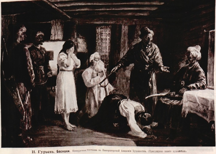 Картины художника Гурьева Ивана Петровича (1875-1943)